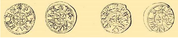 Pietro Orseolo - denáry